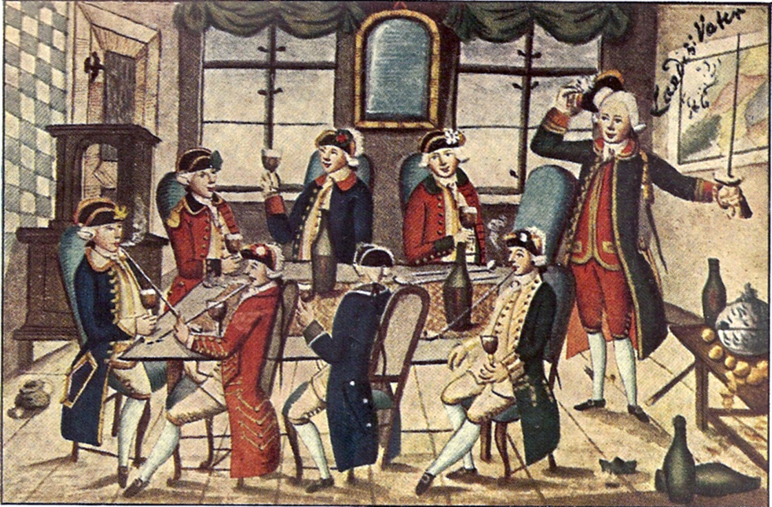 Studenten verschiedener Göttinger Landsmannschaften bei einem Kommers auf Stube. Stammbuchblatt (Aquarell). Der ganz rechts stehend hervorgehobene Student (wohl in der Uniform der Kurländischen Landsmannschaft) ruft mit dem erhobenen Schläger in der Hand die Teilnehmer des Kommerses zum Landesvater (Studentenverbindung) auf.